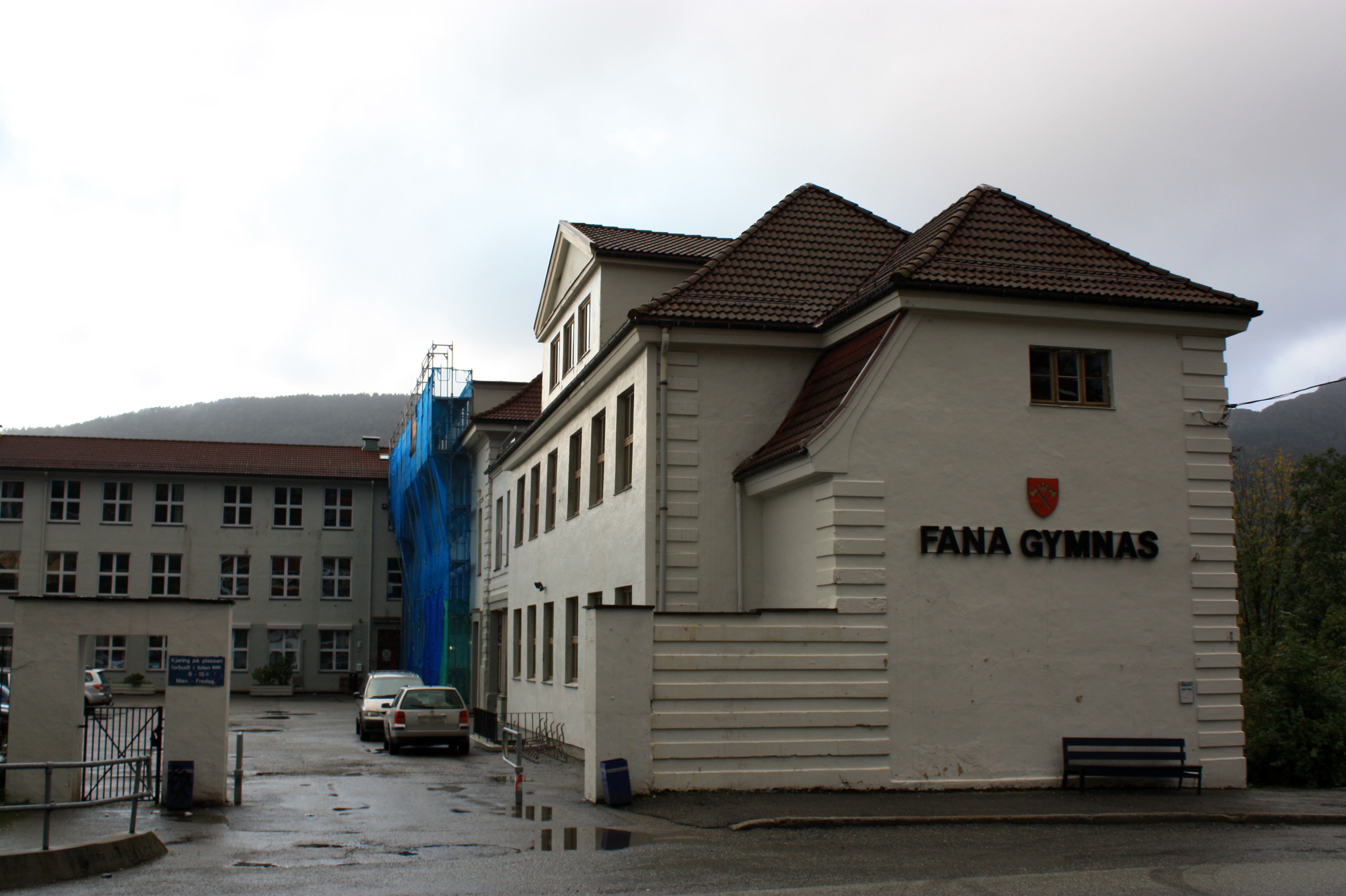 Fana gymnas, Fana, Bergen.